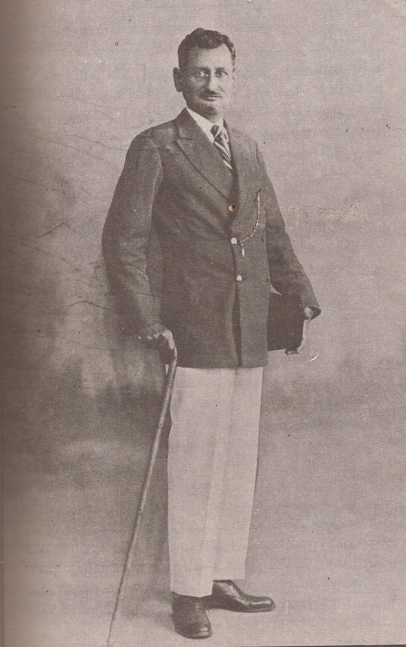 تصنيف:أحمد فضل القمندان